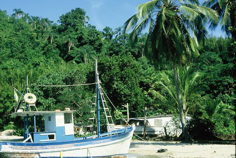 Ilha Grande, Rio de Janeiro, Brasilien, Naturpark, Fischerboot